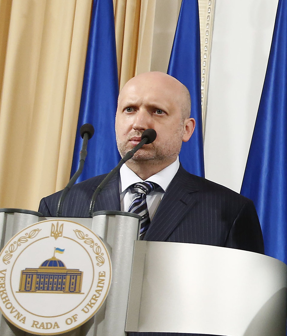 Außenminister Sebastian Kurz trifft im Rahmen seines Arbeitsbesuches gemeinsam mit Generalsekretär Thorbjorn Jagland mit dem ukrainischen Präsidenten, Alexander Turtschinow und Ministerpräsident Arsenij Jazenjuk, zusammen. Kiev, 10.03.2014, Foto: Dragan Tatic